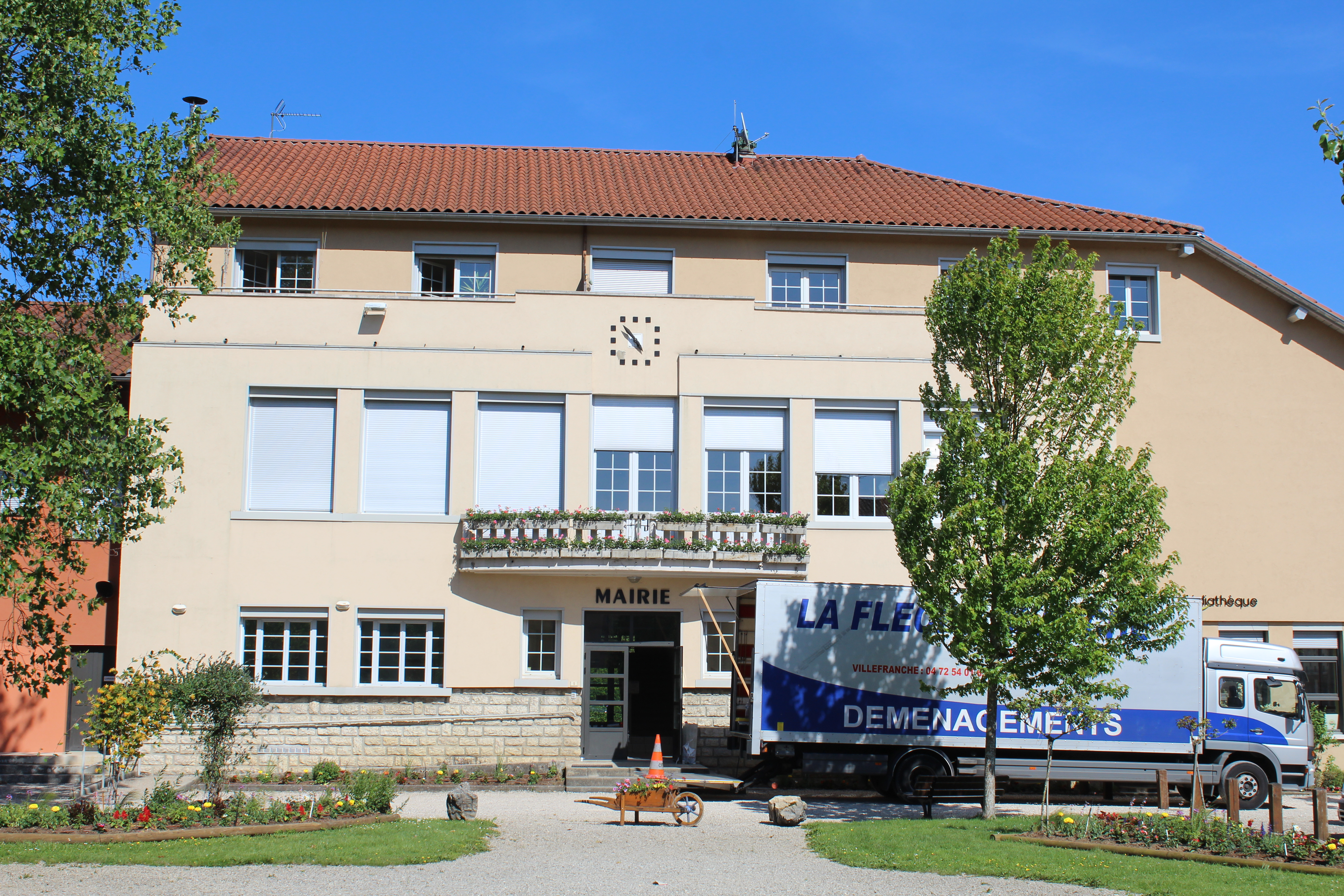 Mairie de Chavannes-sur-Suran, actuelle mairie de la commune nouvelle de Nivigne-et-Suran.